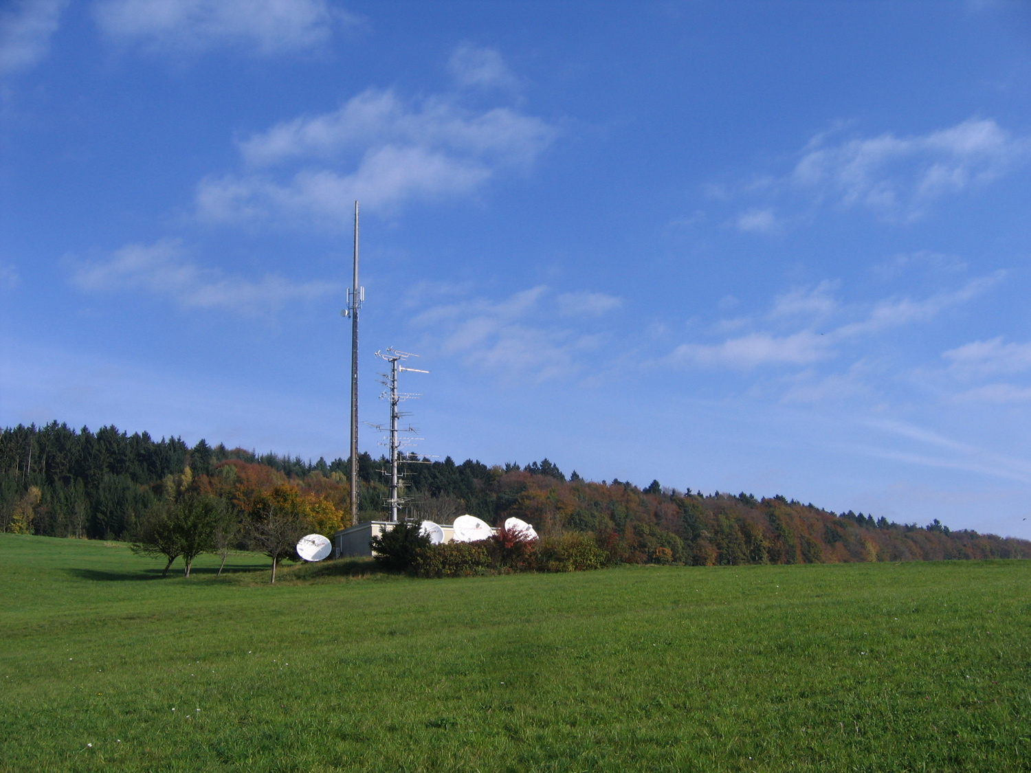 TV Eichberg, (Kabel-)Lokalfernsehsender 1994-96 in Baden-Württemberg im Landkreis Waldshut. Die vom Sender benutzte Anlage der ACOTEC nahe der Gemeinde Dettighofen am Eichberg.